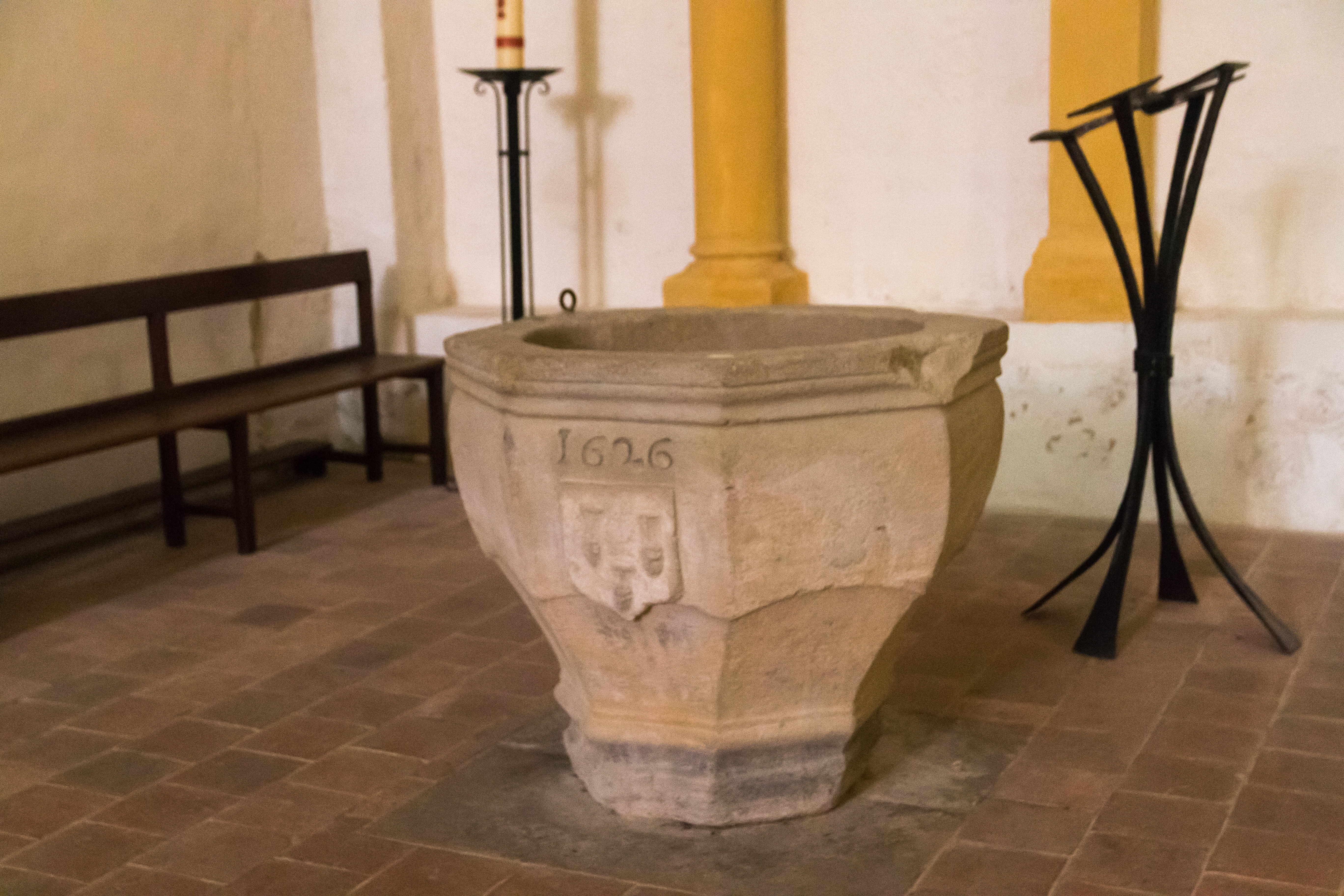 Baptismal fonts.